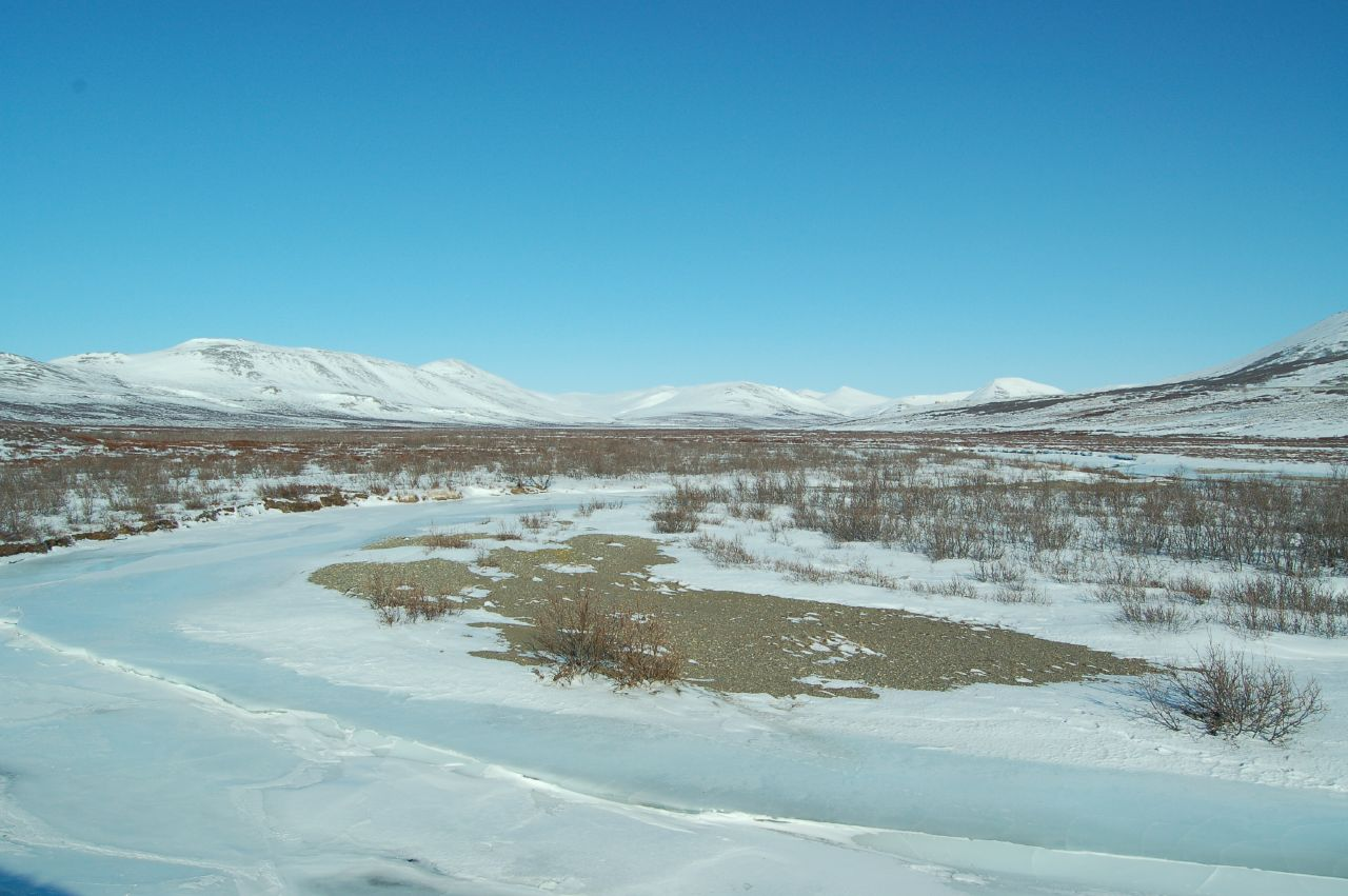 nome river valley